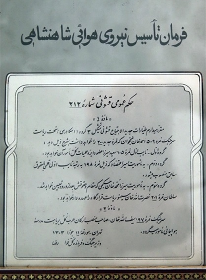 تاریخ 1303/03/11